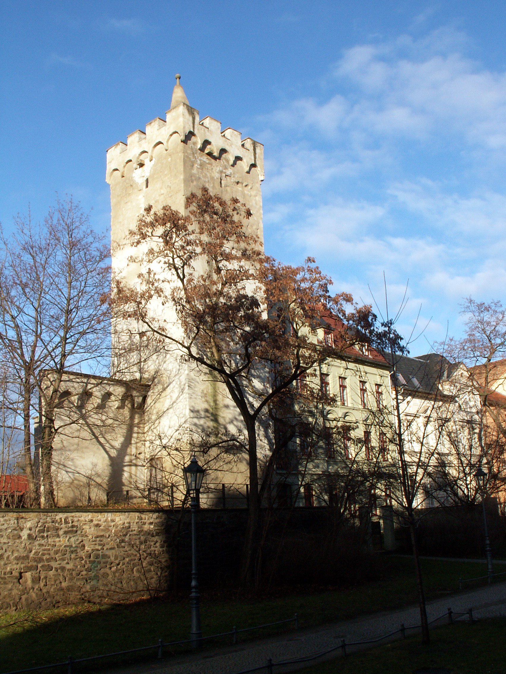 Turm am Marsfeld in Aschersleben